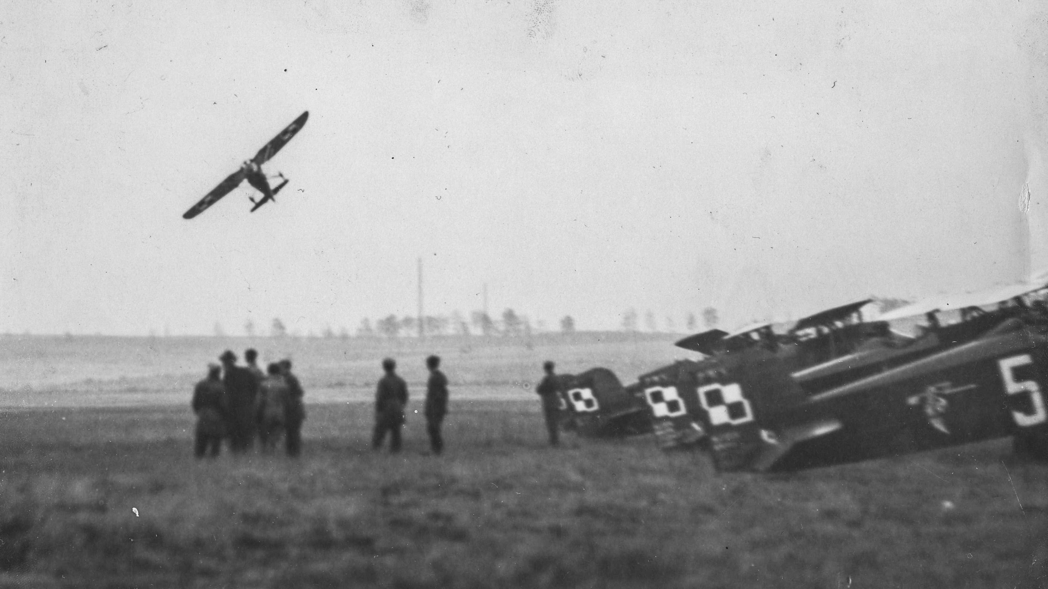 Pokazy lotnicze w Katowicach; październik 1931. Grupa osób obserwuje ewolucje kpt. Bolesława Orlińskiego. Obok widoczne samoloty 121 eskadry myśliwskiej 2 pułku lotniczego z godłem "skrzydlaty grot". Koncern Ilustrowany Kurier Codzienny - Archiwum Ilustracji. Sygnatura: 1-W-1643-5